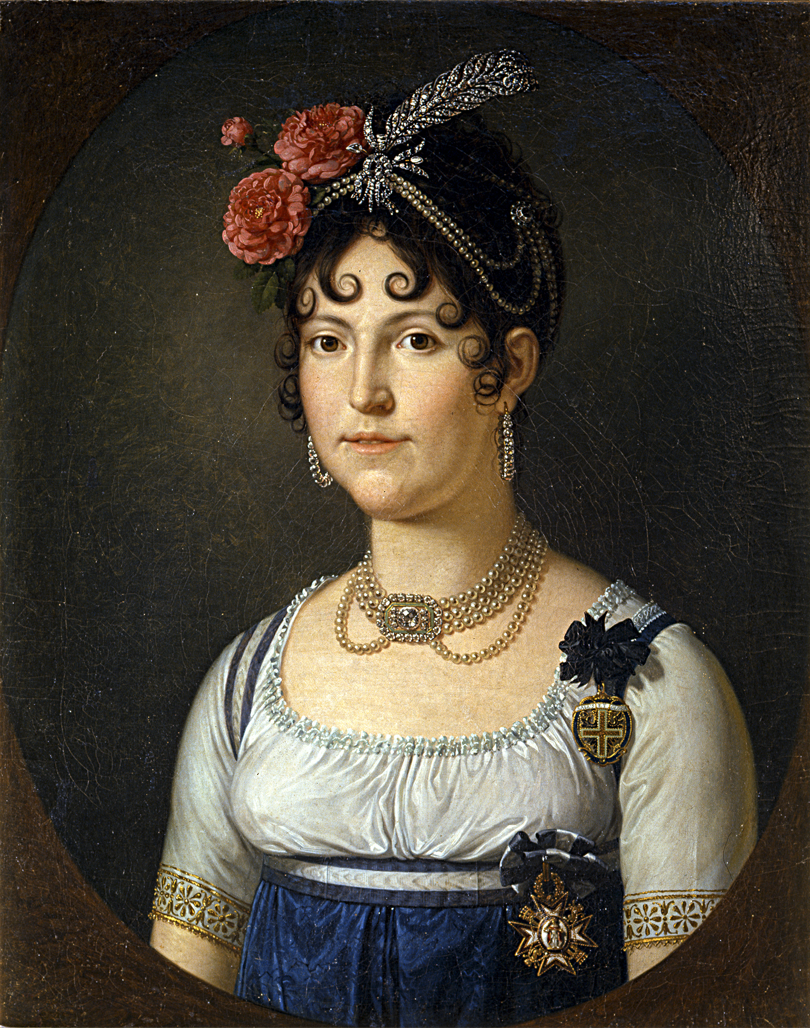 Ritratto di Maria Luisa di Borbone enPortrait of Maria Luisa of Spain, Duchess of Lucca (1782-1824)